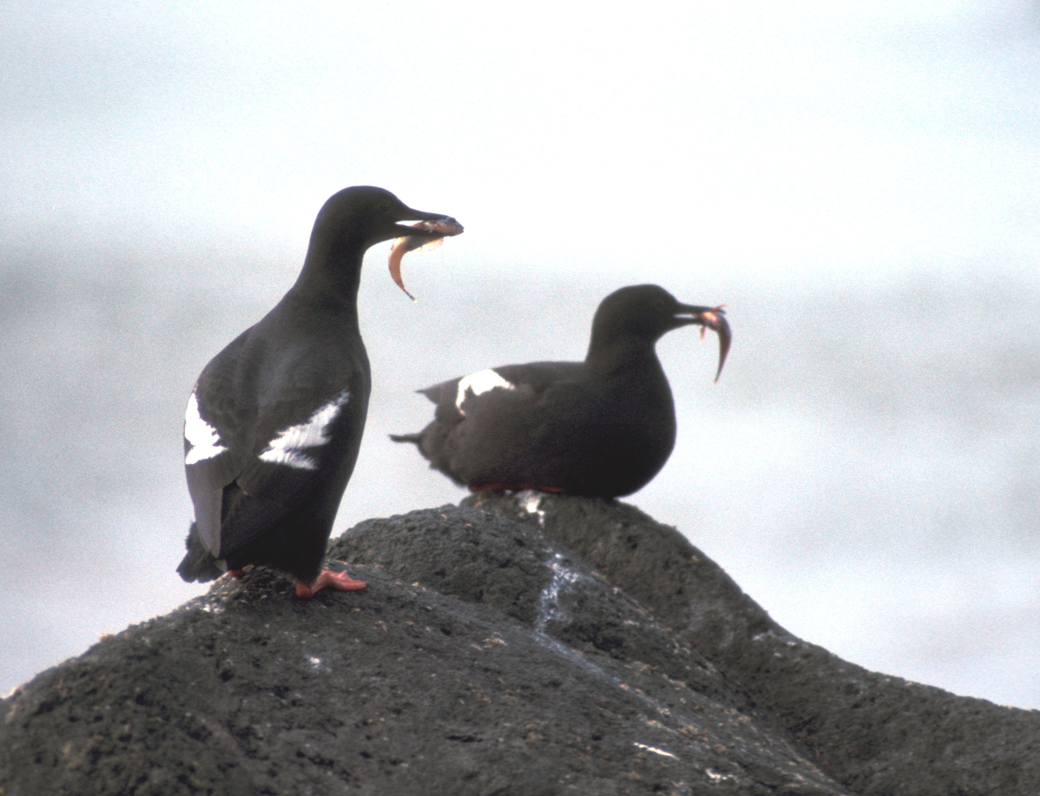 Pigeon Guillemots (Cepphus columba)